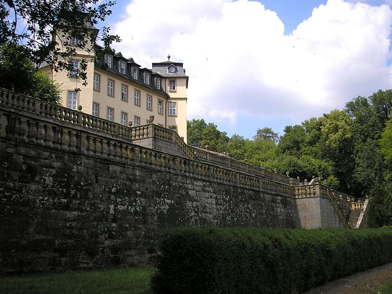 Schloss Untermerzbach (Landkreis Haßberge, Unterfranken) / Untermerzbach Castle, Lower Franconia, Germany. Ansicht aus dem Schlosspark / View from the park. Eigene Aufnahme, Juni 2006 / Own photo, June 2006